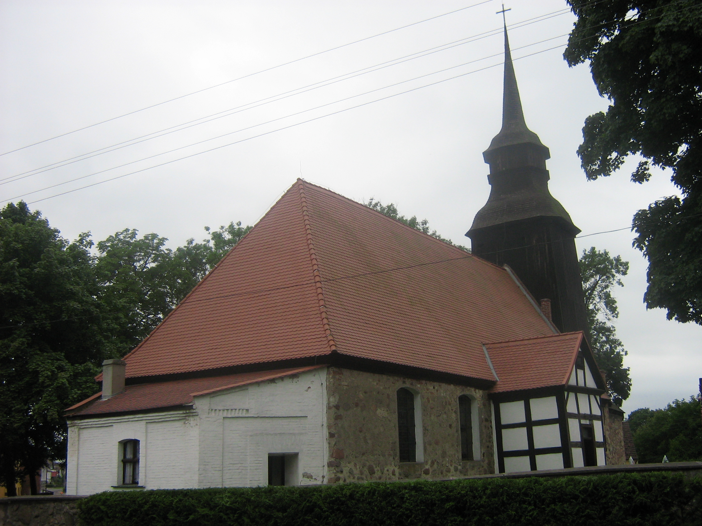 Kościół Wniebowzięcia NMP w Przybiernowie (zabytek nr rejestr. 324)